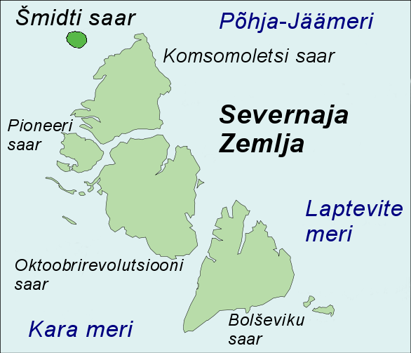 Šmidti saare asukoht